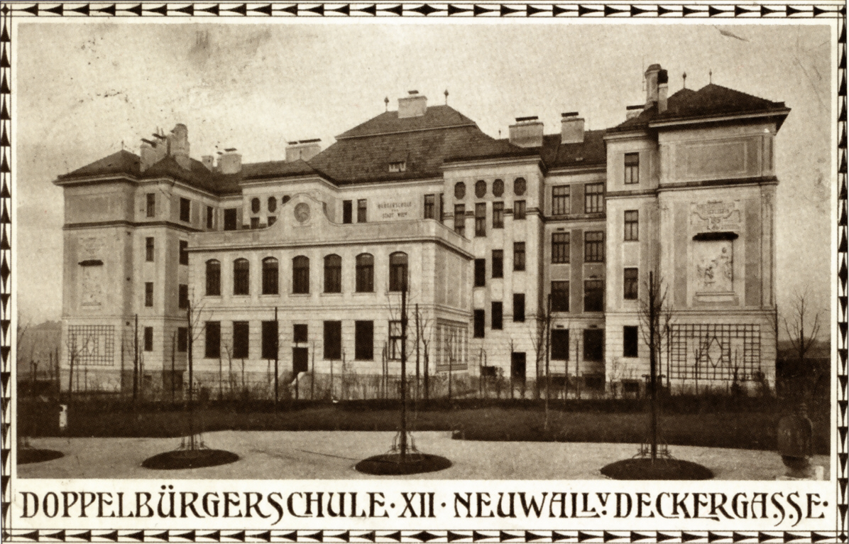 Doppelbürgerschule Deckergasse/Neuwallgasse, 1910, Wien-Meidling